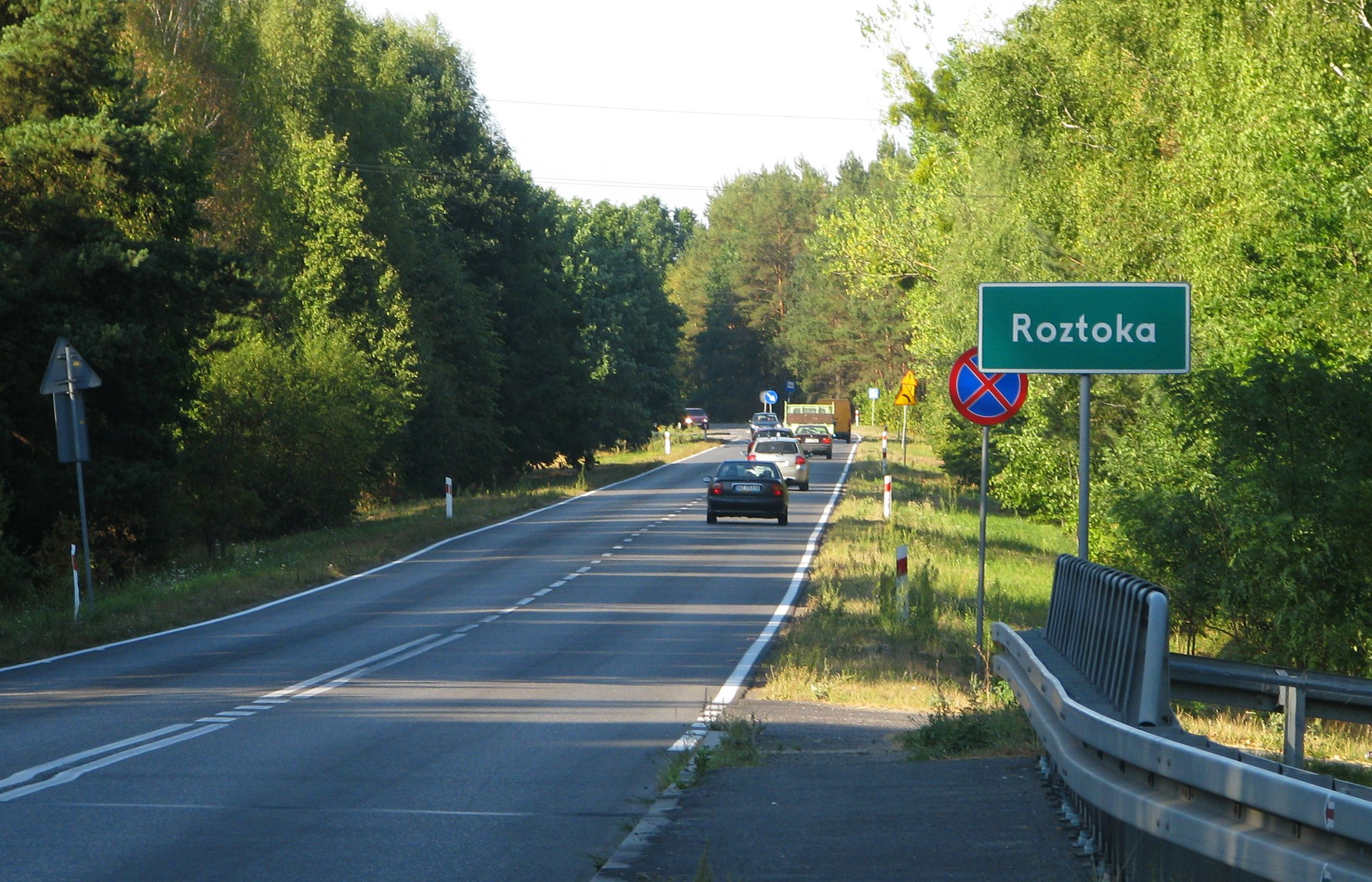 Roztoka, gmina Leszno